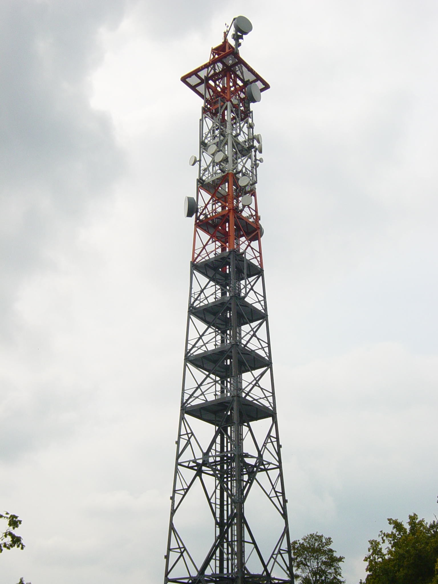 Stoppelberg, Sendemast